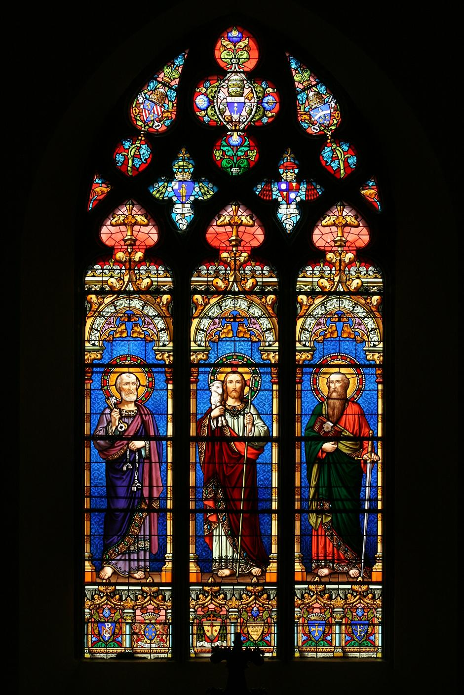 Cassagnes-Bégonhès (Aveyron - France) - Vitrail